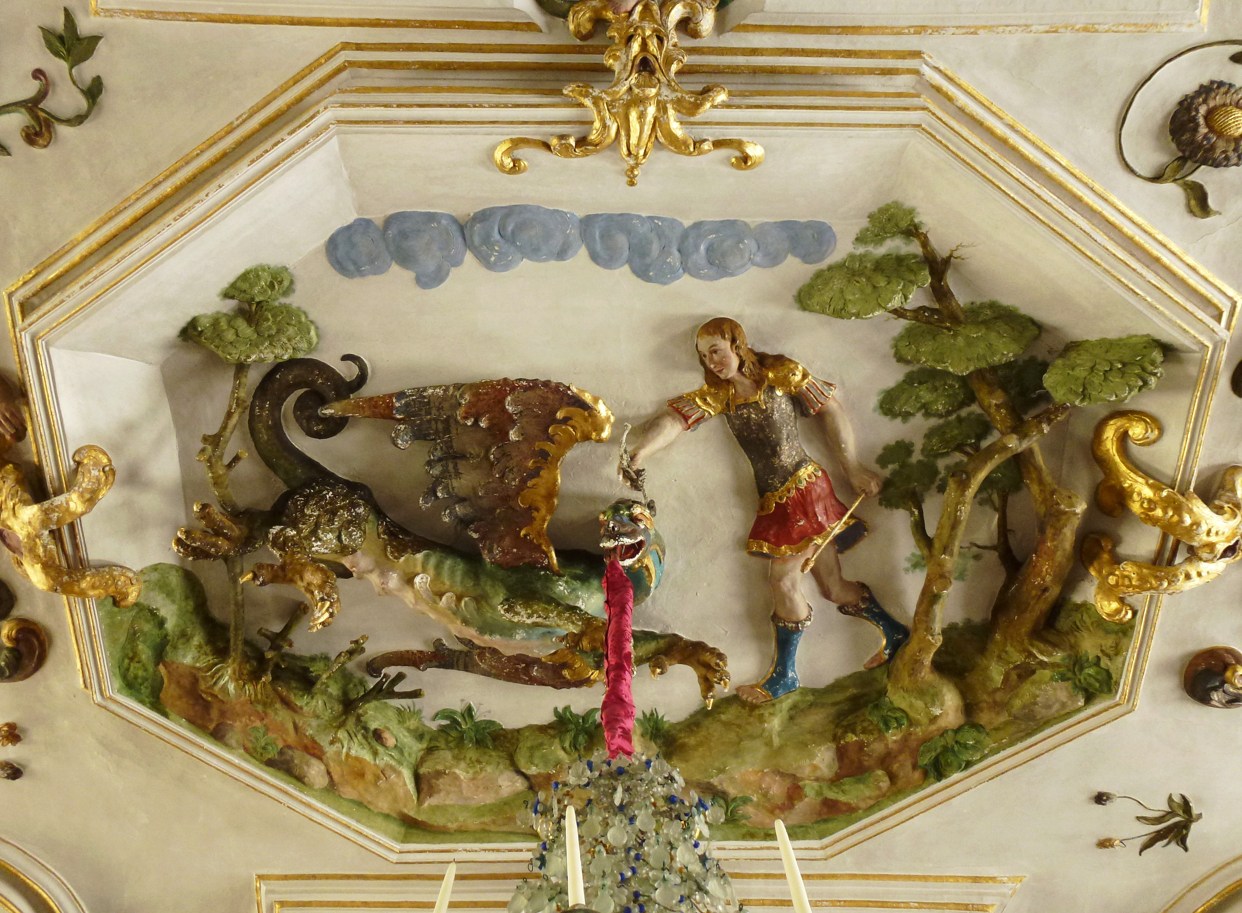 Skokloster Kungssalen tak, mittrosett, "Hjälten Jason häller gift i drakens öga". Kungssalen på Skoklosters slott ligger i andra våningen. Takstuckaturen i Kungssalen utfördes av Hans Zauch (död 1666) åren 1663-1664.